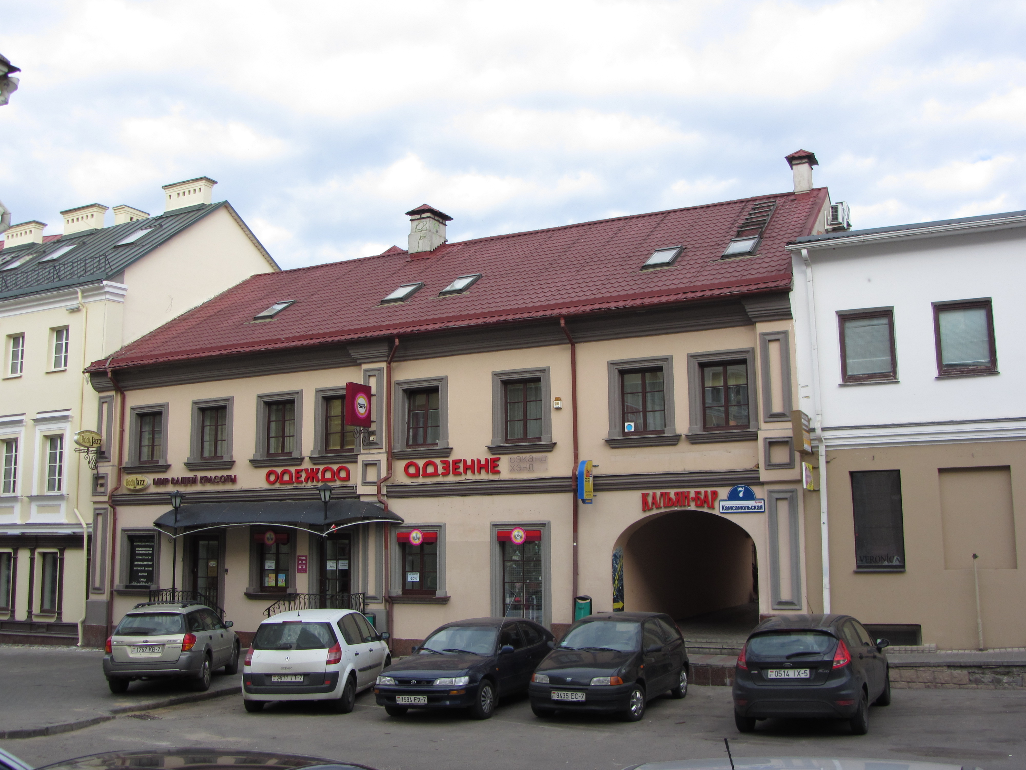 Беларуская (тарашкевіца): Камсамольская 7, Менск